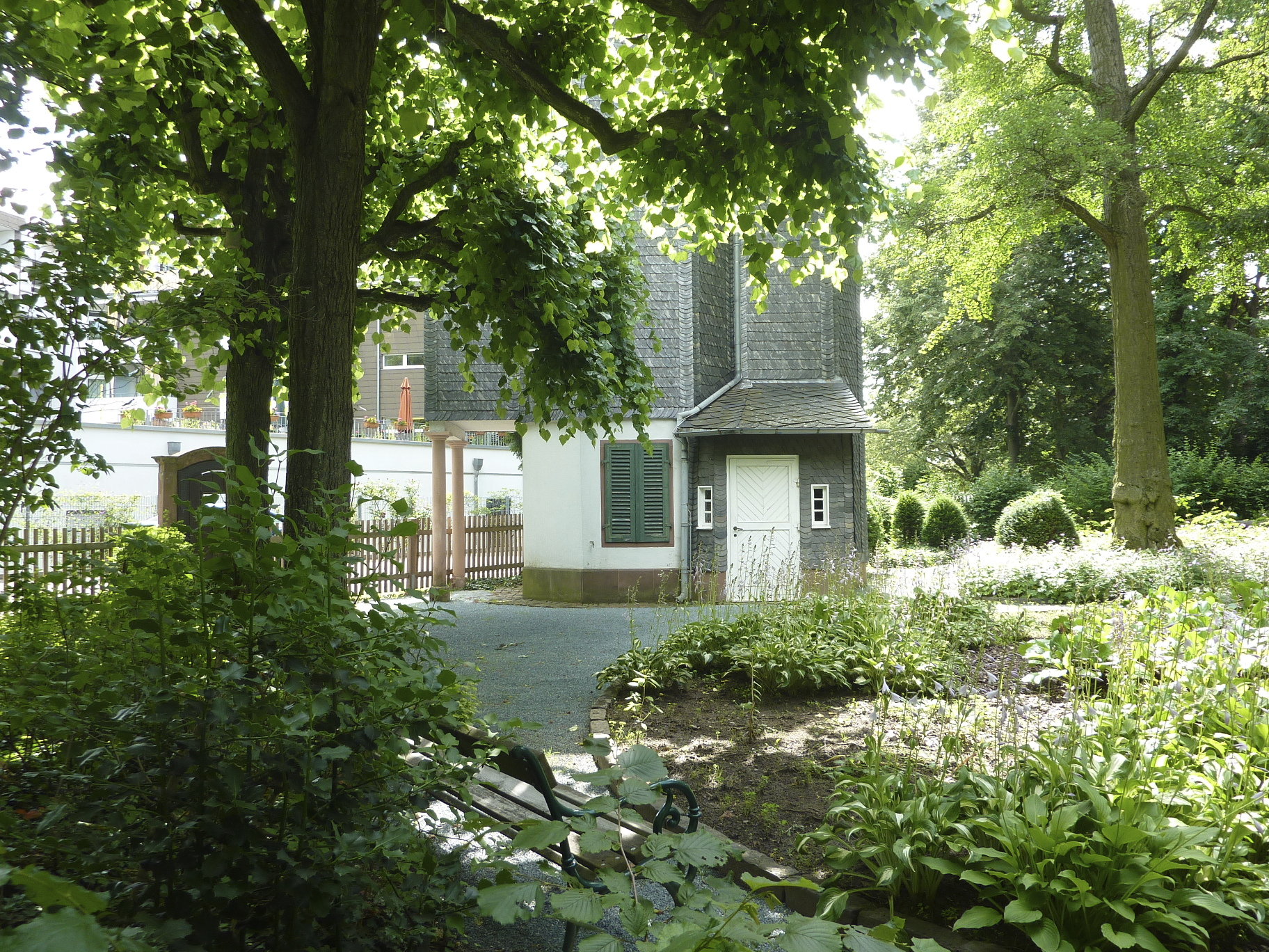 Frankfurt am Main, Stadtteil Sachsenhausen: Das Willemer-Häuschen oder Willemer-Gartenhaus ist ein klassizistisches Gartenhaus aus dem frühen 19. Jahrhundert. Bekannt wurde es durch die dortigen Begegnungen des Dichters Johann Wolgang von Goethe mit Marianne von Willemer im Jahr 1814. Im Zweiten Weltkrieg wurde das Originalgebäude zerstört und anschließend am selben Ort originalgetreu wieder aufgebaut. Heute befindet sich im Haus eine Goethe-Gedenkstätte. Das Foto zeigt eine Seitenansicht des Gebäudes von Norden, gesehen vom Willemerschen Garten aus